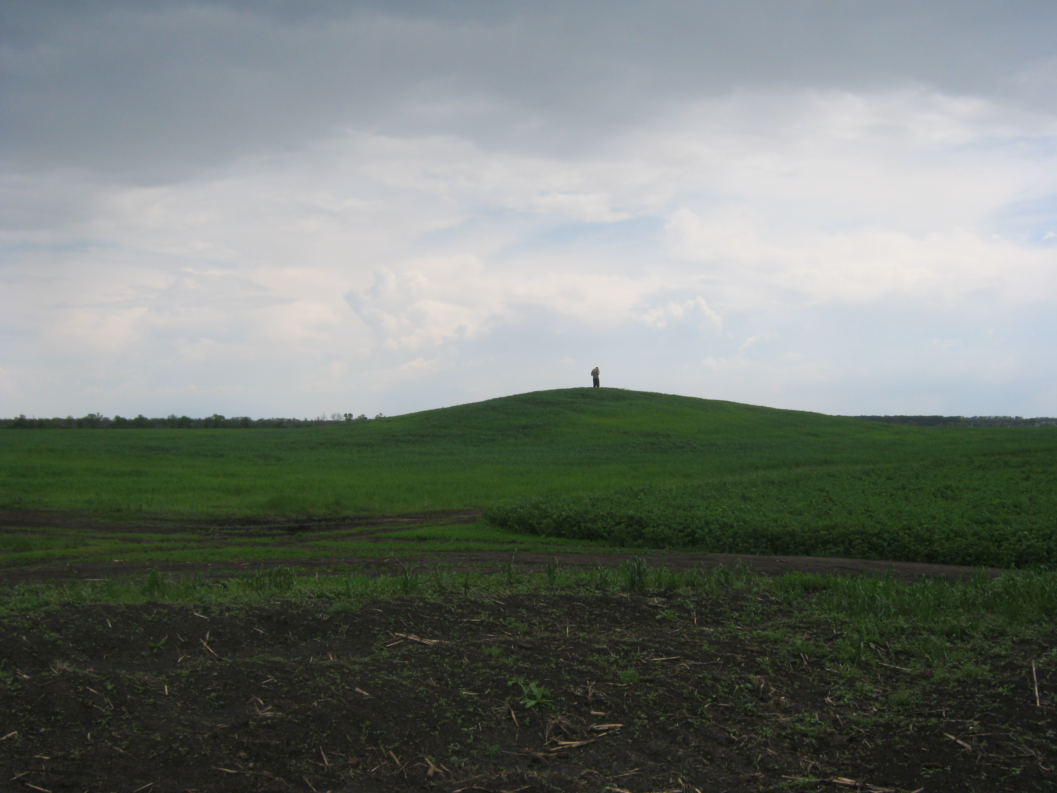 Кургани, Красне, 5 курганів, розташовані на південни захід від селища